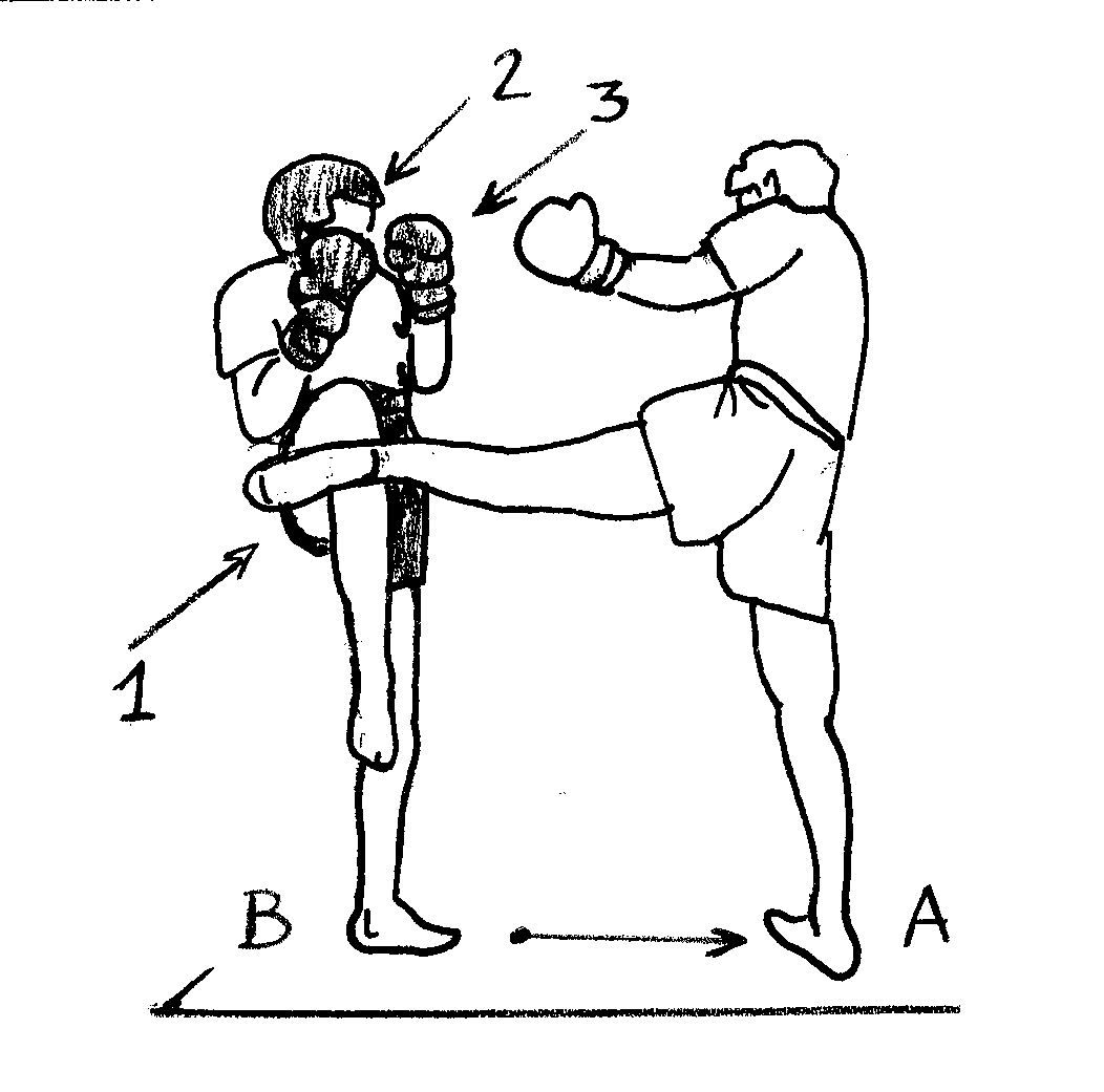 circulaire15.jpg